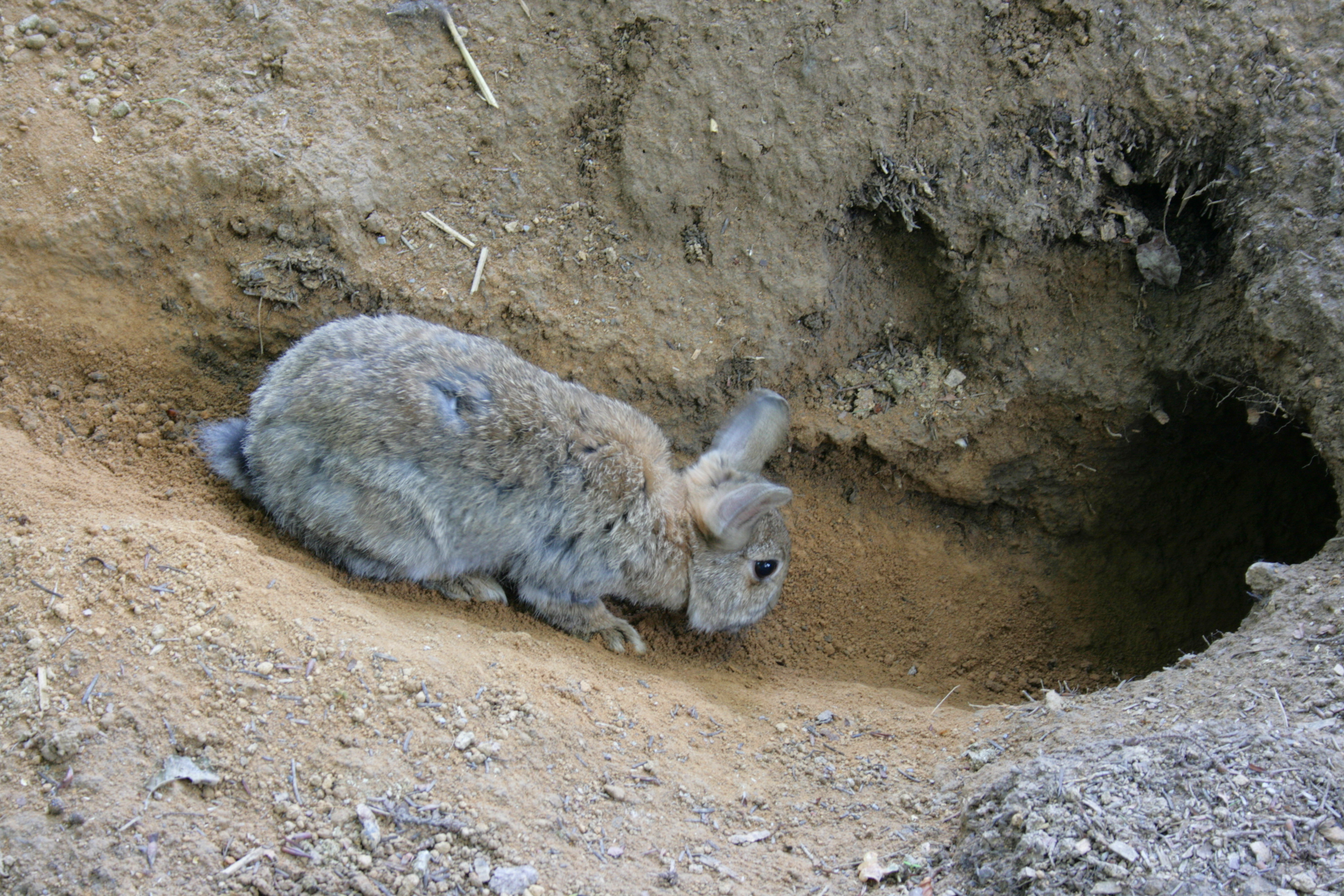 Kaninchen Oryctolagus cuniculus im Tierpark Fauna in Solingen-Gräfrath